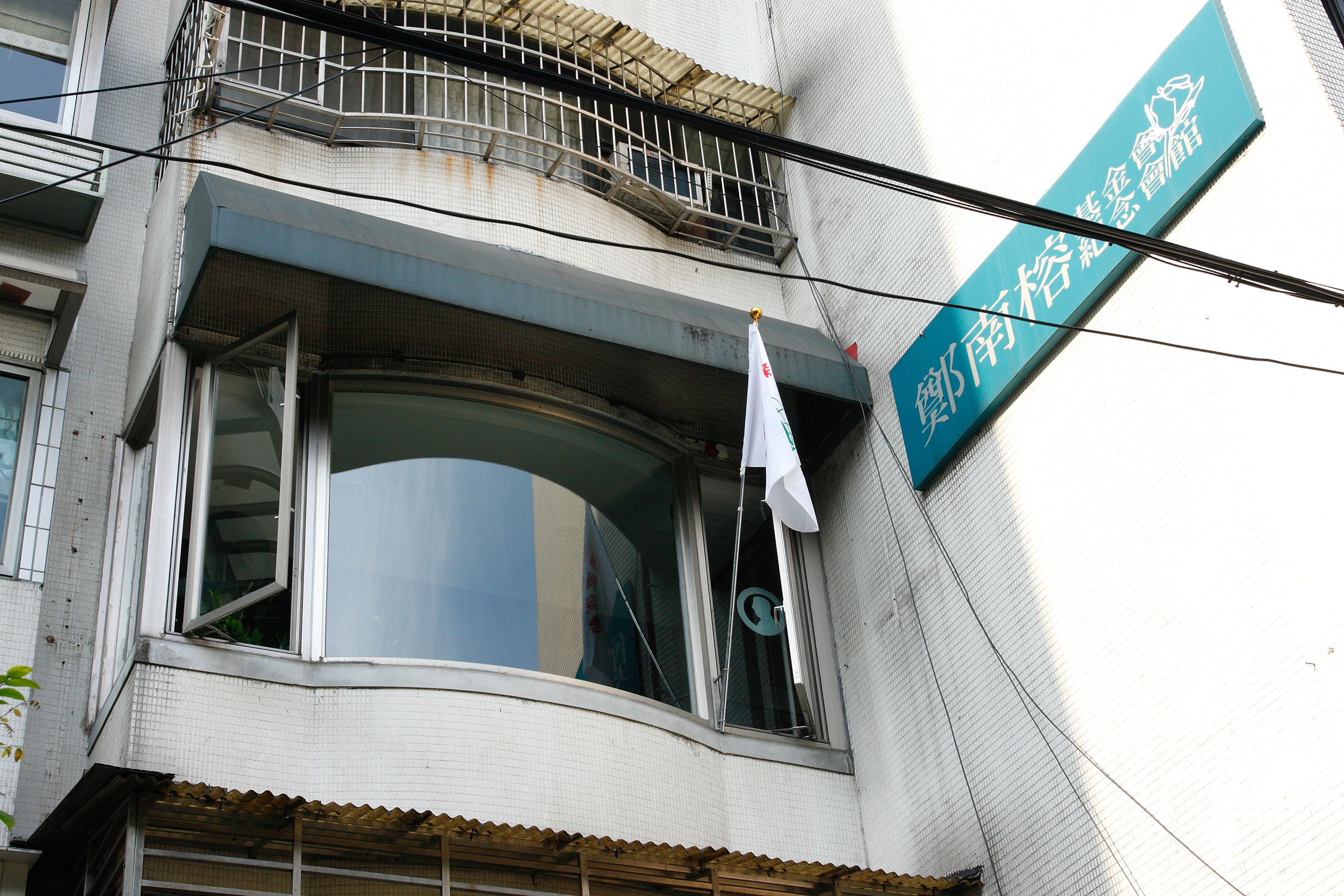 鄭南榕紀念會館